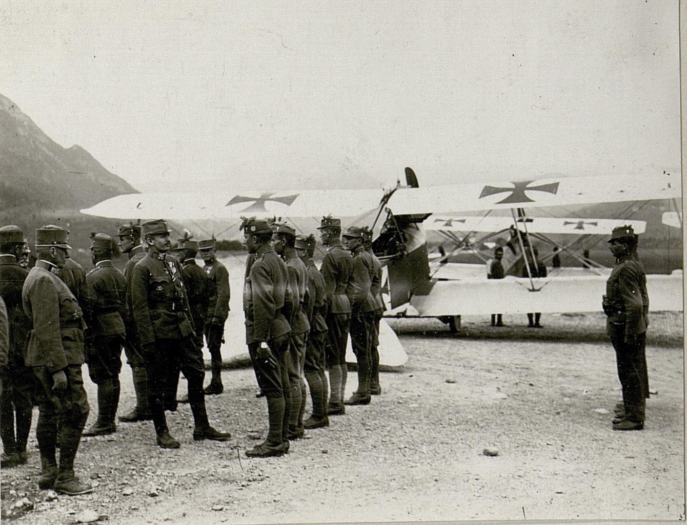 Besuch Sr.Majestät Kaiser Karl in Pergine